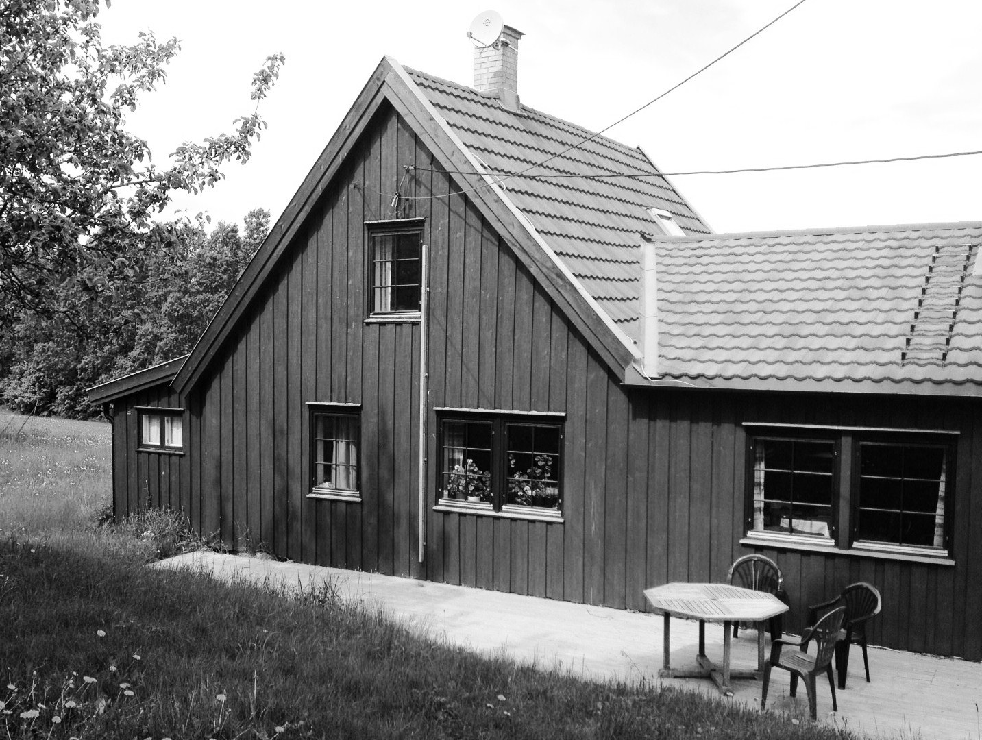 Nyjordet, Ekeberg, Oslo, 2012